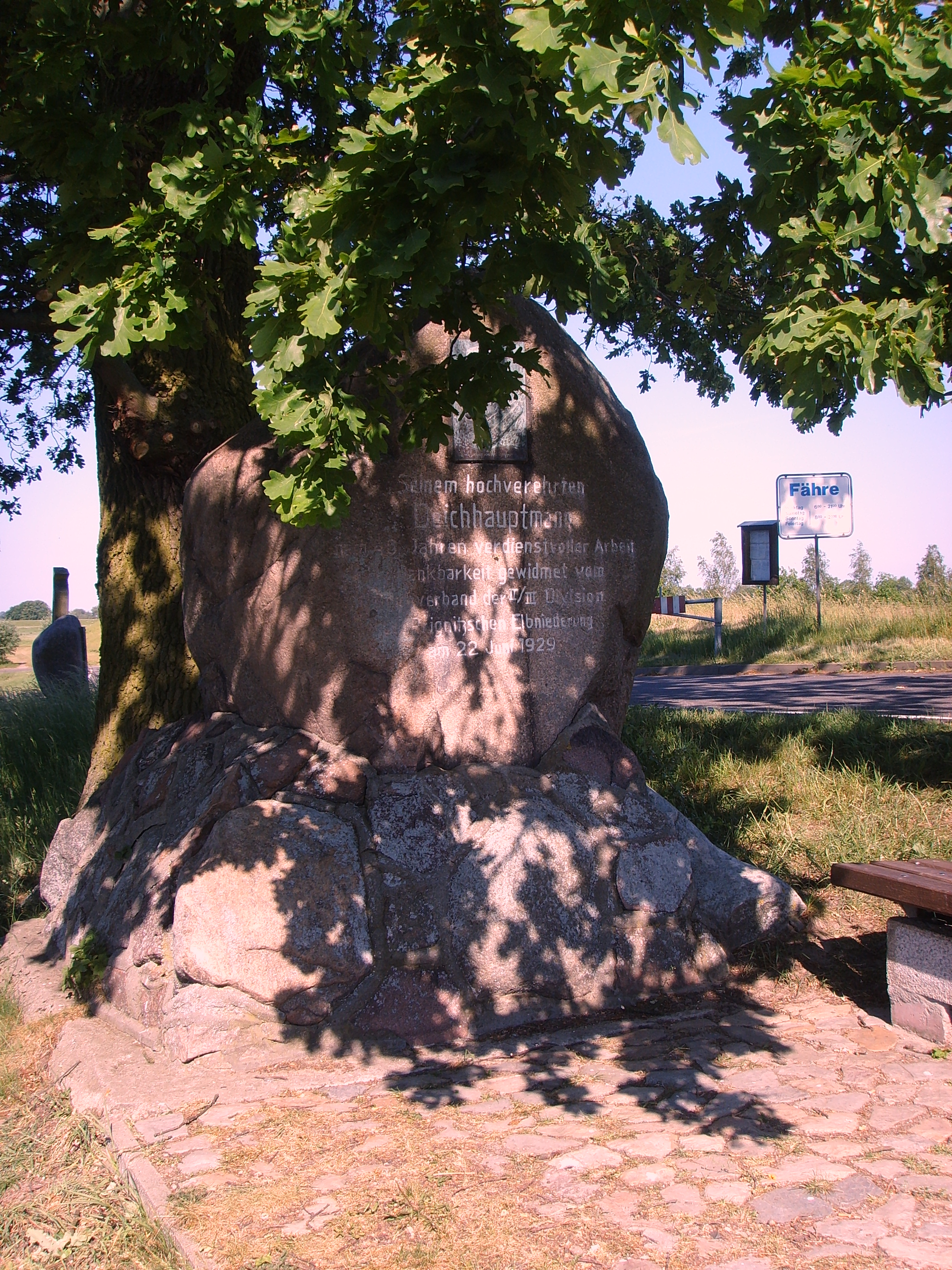 Denkmalgeschützter Gedenkstein für den Deichhauptmann Adolf Freiherr von Wangenheim-Wake